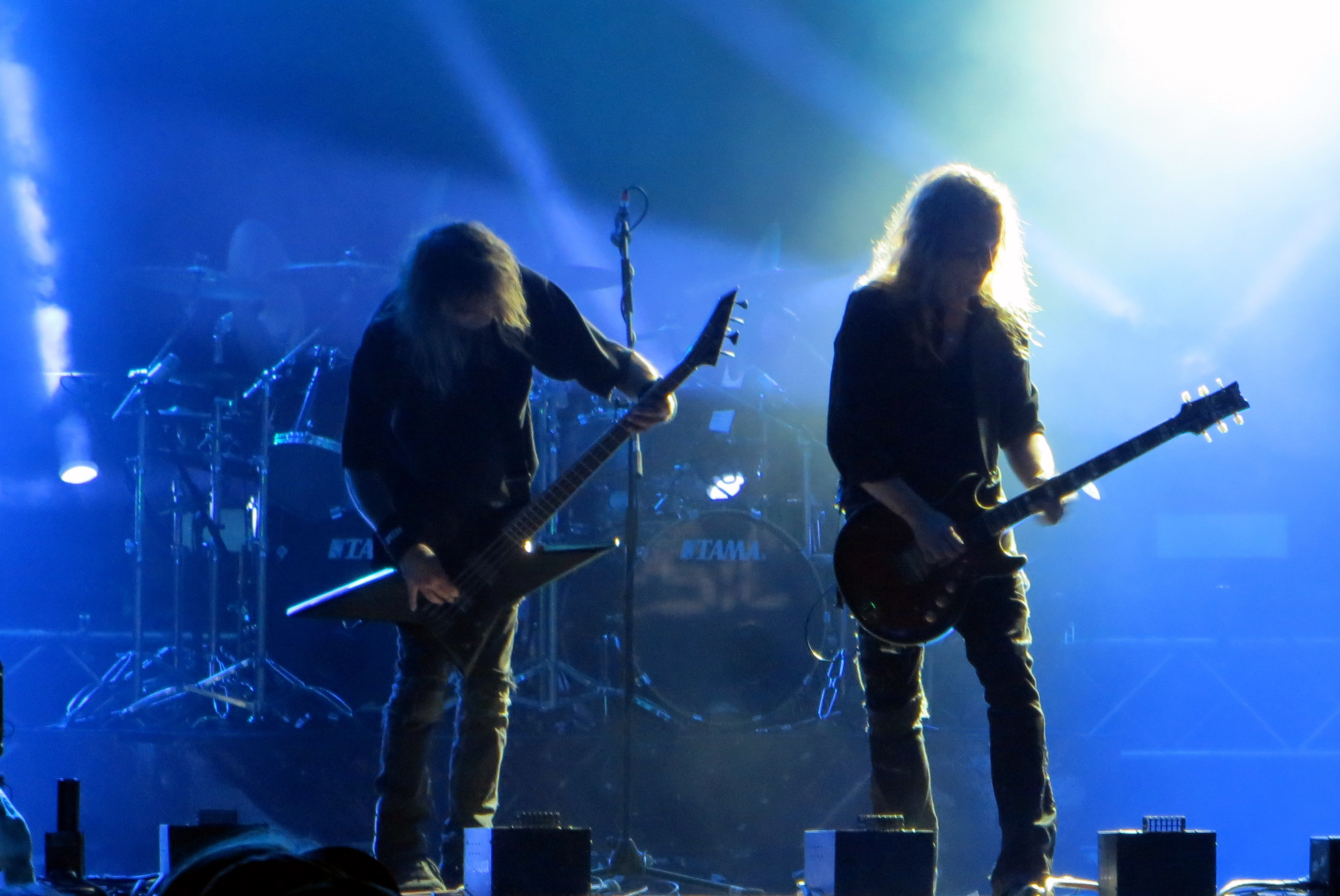 Четвертий фестиваль Atlas Weekend. Гурт Kreator